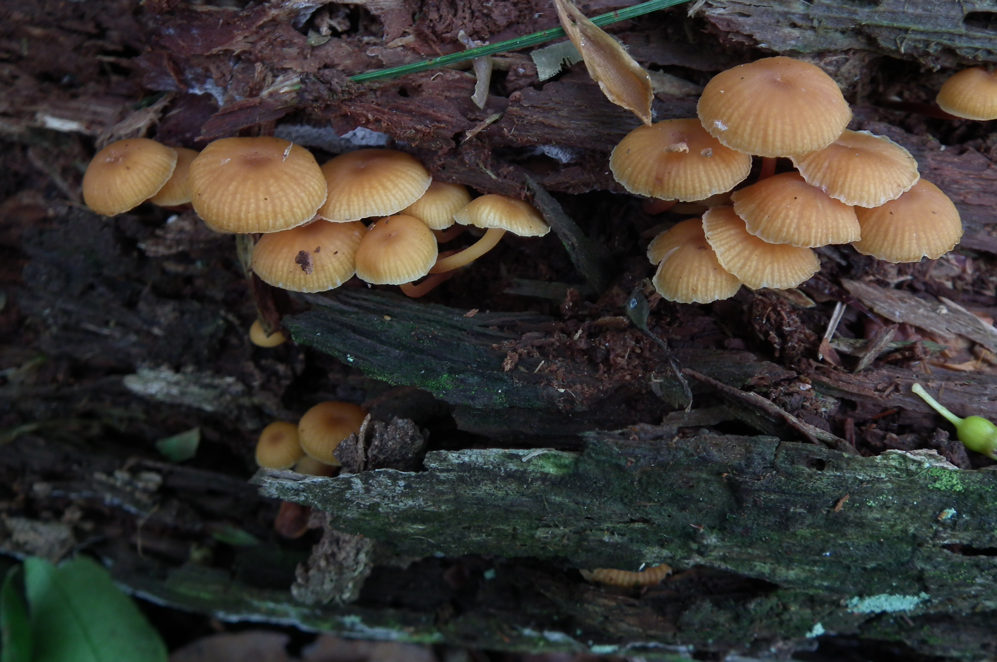 Xeromphalina campanella ヒメカバイロタケ